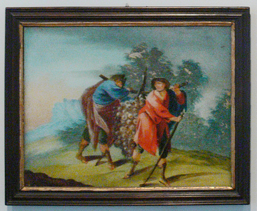 Hinterglasbild „Josua und Caleb“, Augsburg, 1. Hälfte 18. Jh. Landesmuseum Württemberg (Außenstelle Museum für Volkskultur in Württemberg, Waldenbuch) 1.1.1, Inv. Nr. 8058